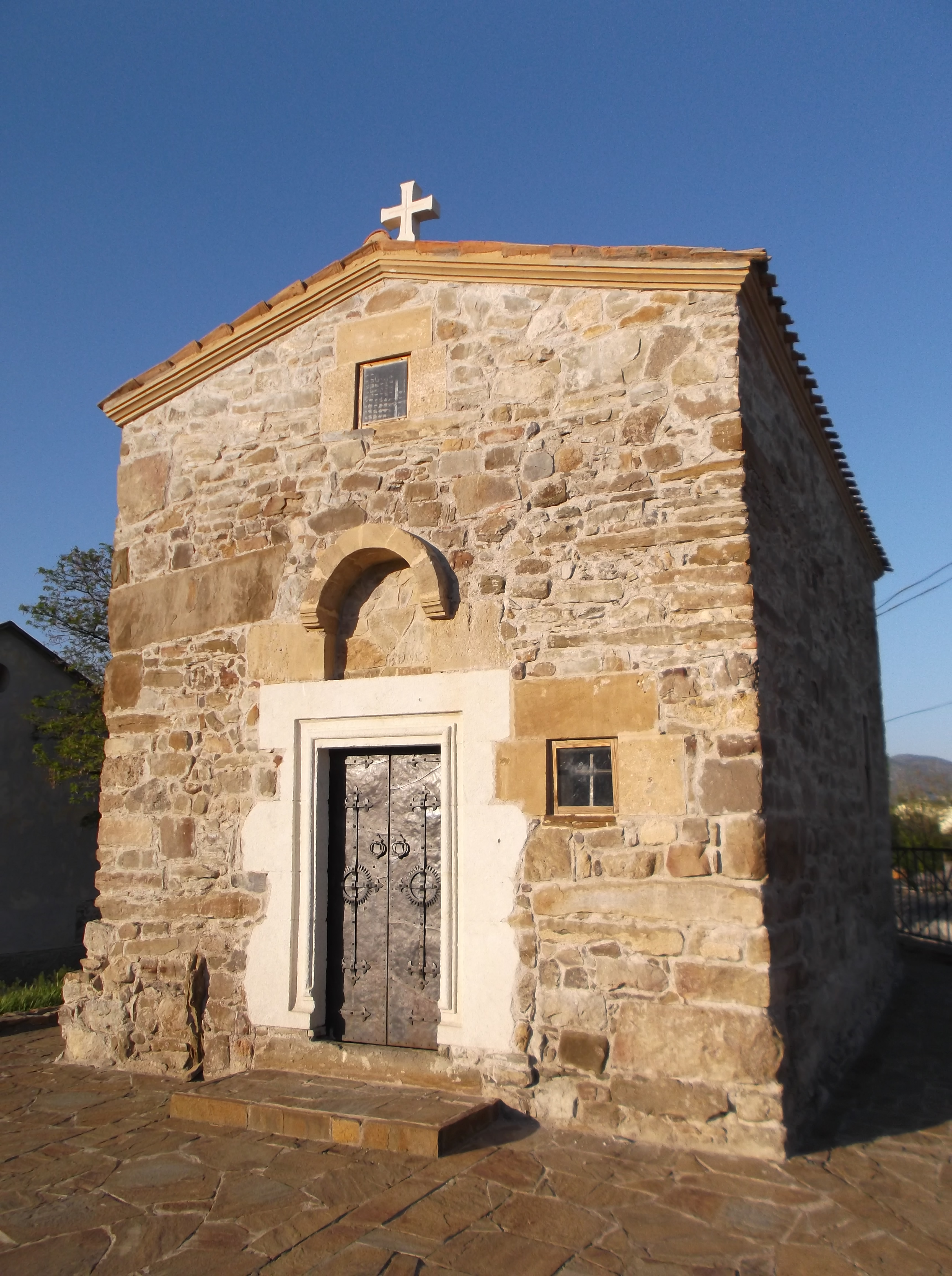 Церква Параскеви, Судак, вул. Приморська, 13